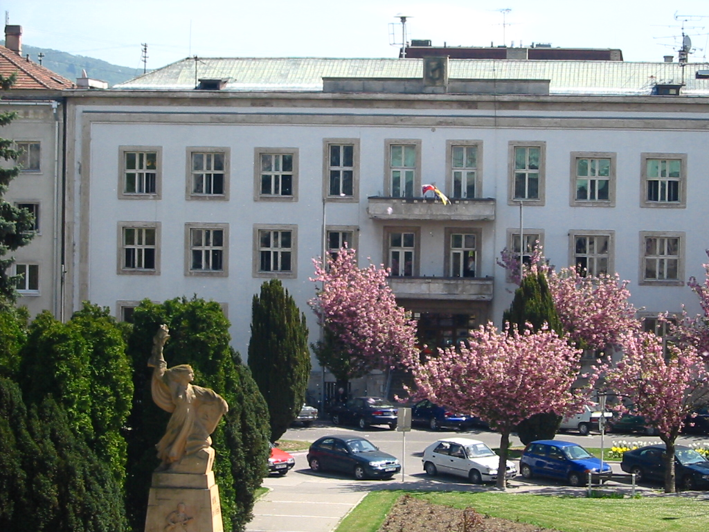 Mestský úrad - detail